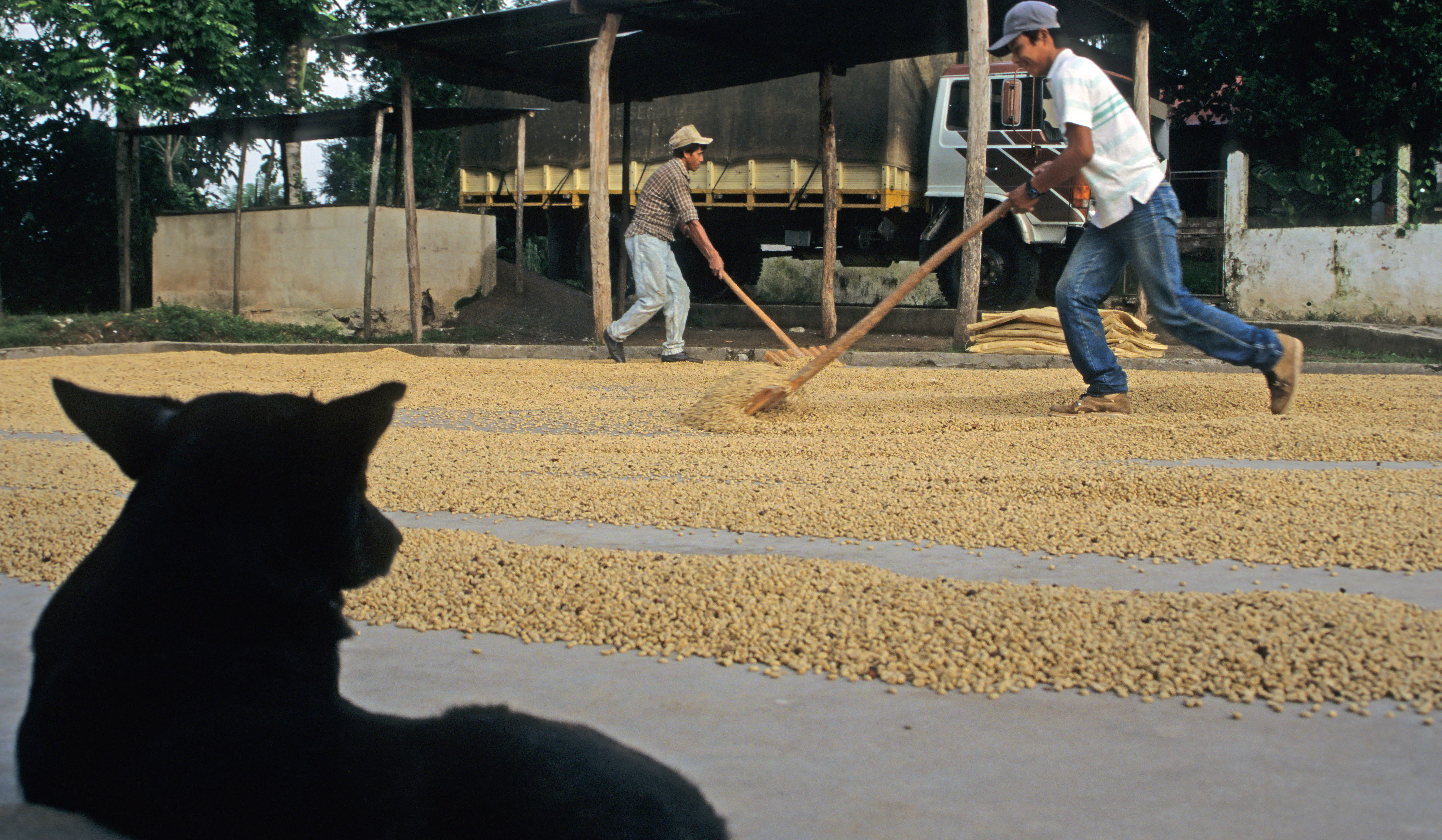 Fresh harvested coffee is being dried in the sun in Lanquín, Guatemala